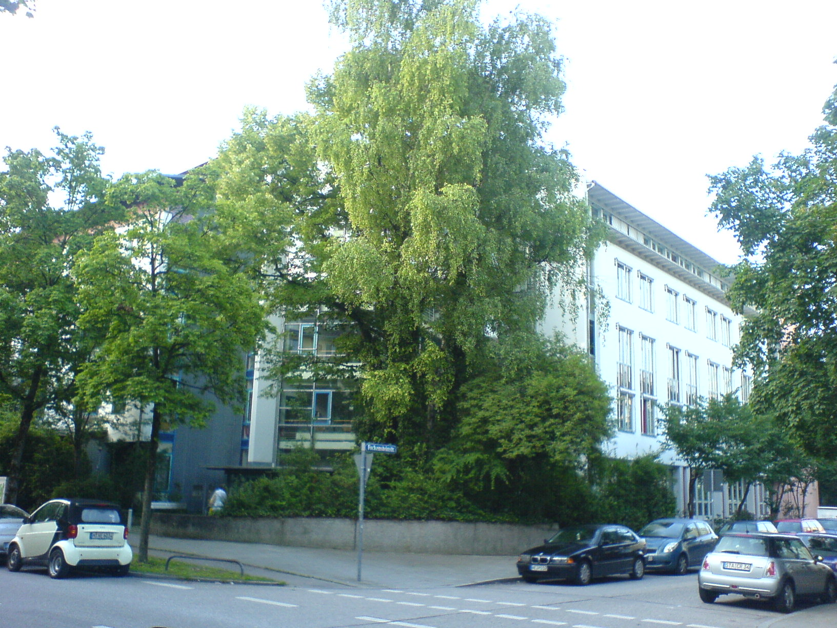 Berufsgenossenschaft für Fahrzeughaltungen, Bezirksverwaltung München (BV 9), Deisenhofener Straße 74, 81539 München